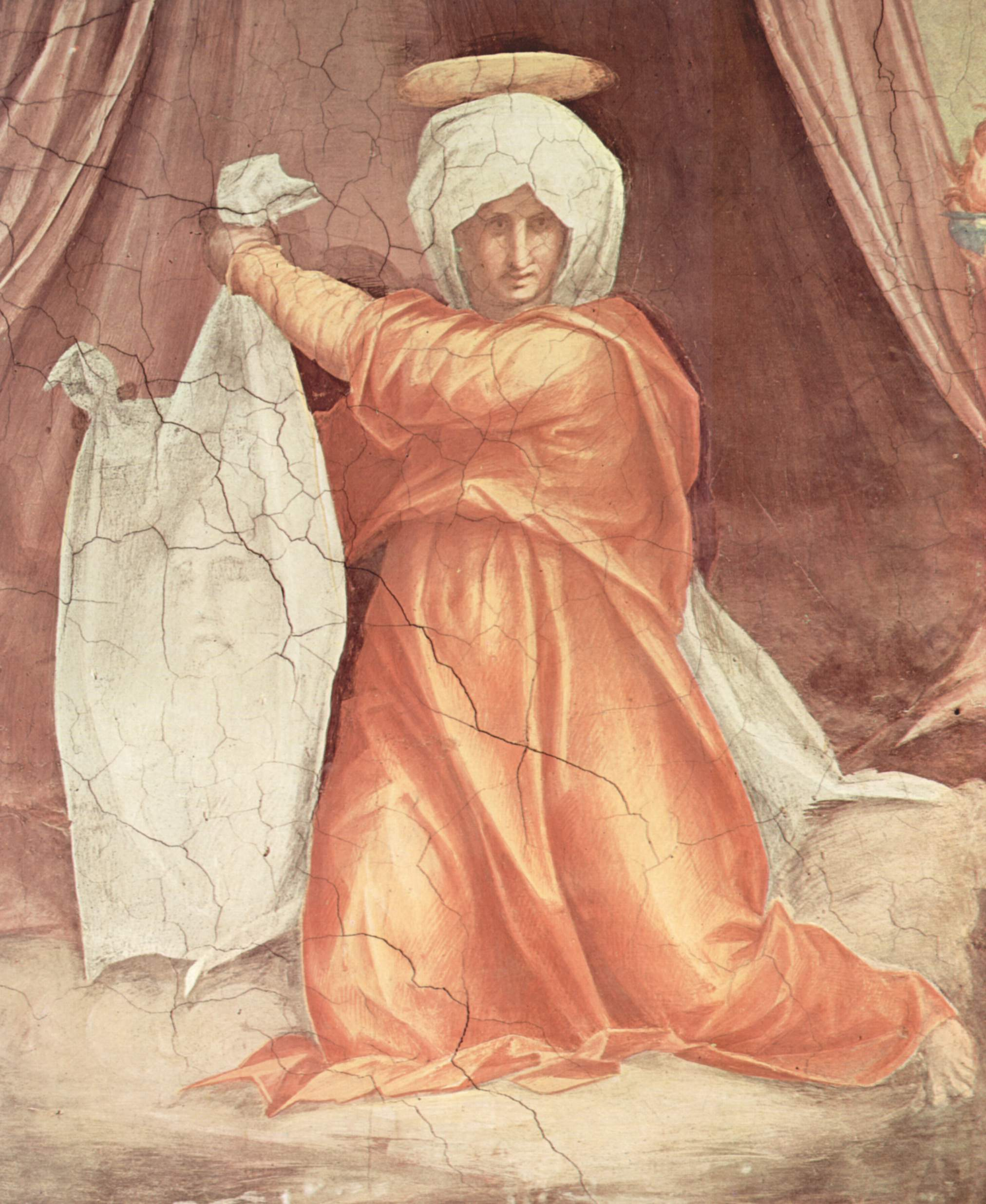 detail